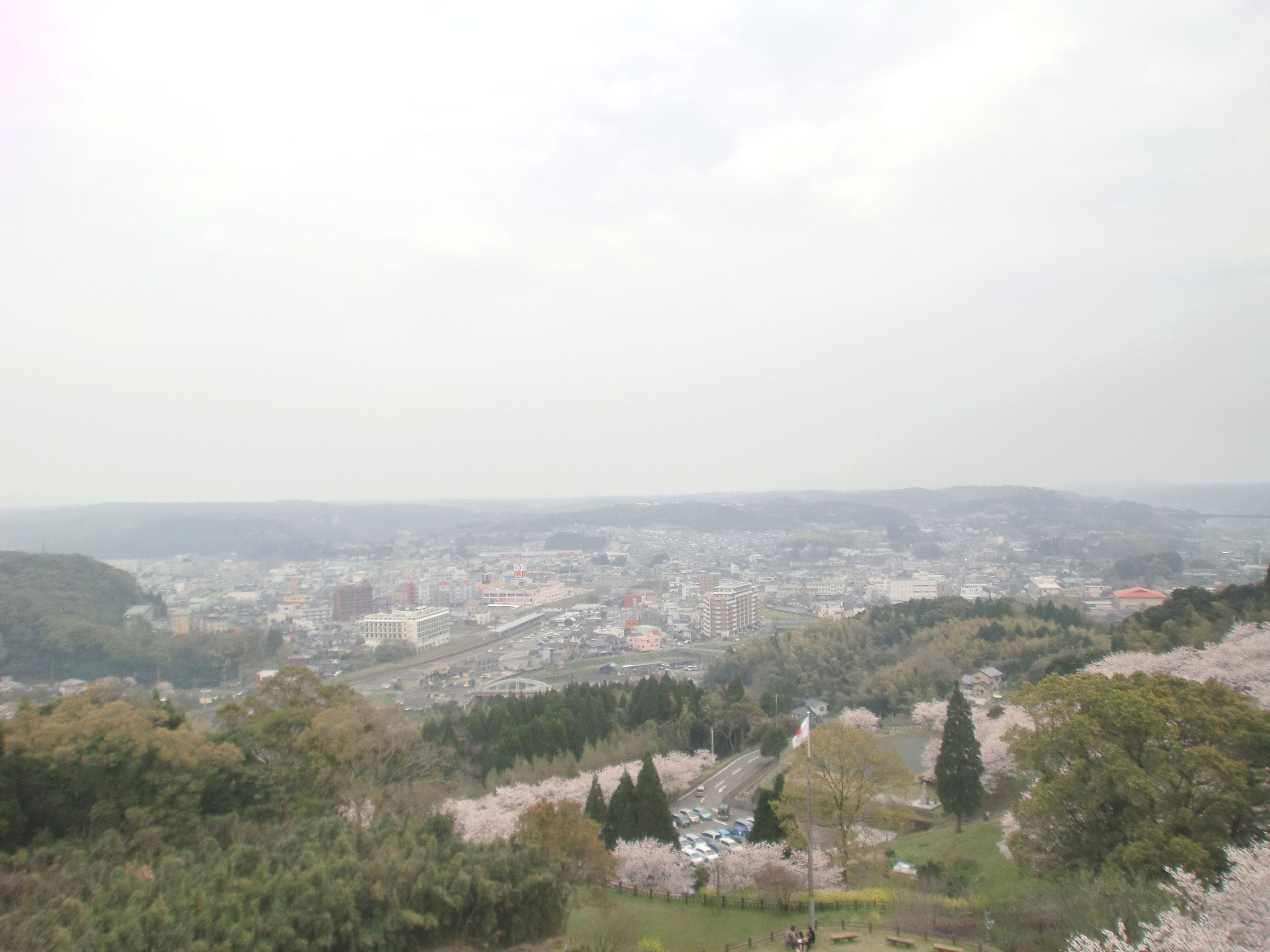 一宇治城址から伊集院市街を望む。